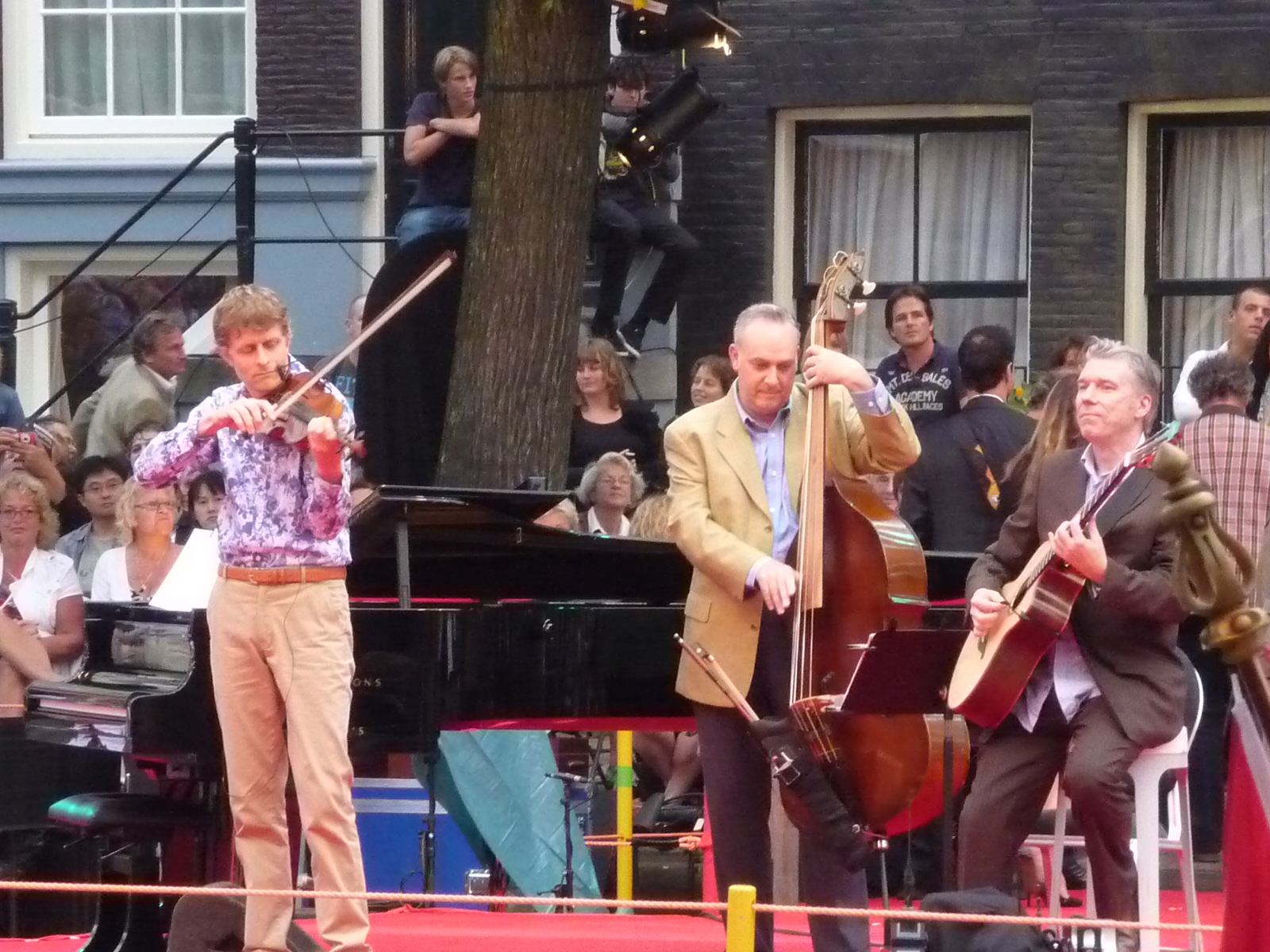 Tim Kliphuis Trio op Prinsengrachtconcert Amsterdam, augustus 2011